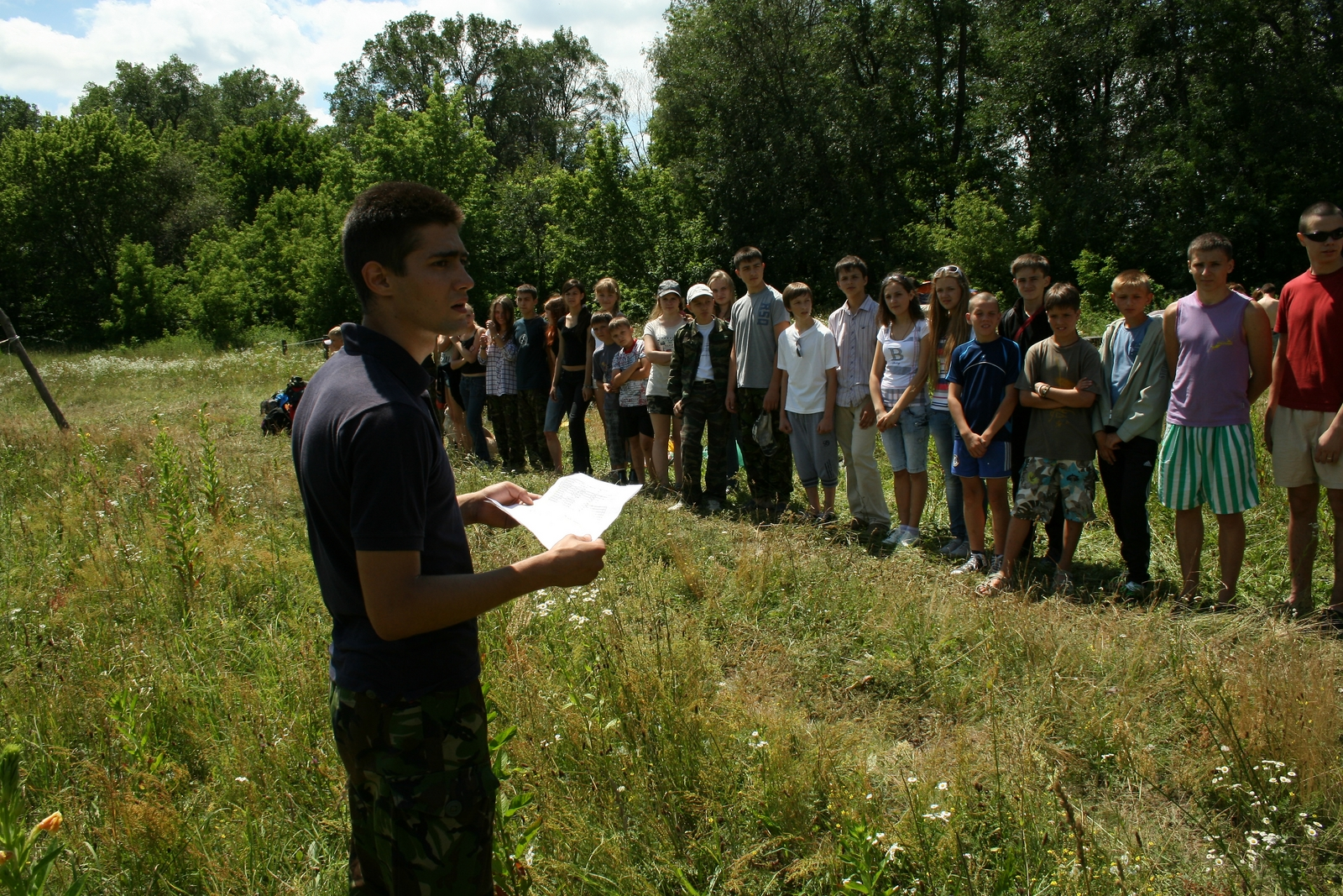 Дитячий наметовий табір "Коловрат - 2012". Роман Атаманюк у ролі бучужного. Фото зроблене активістом ВМГО "Молодіжний націоналістичний конгрес".